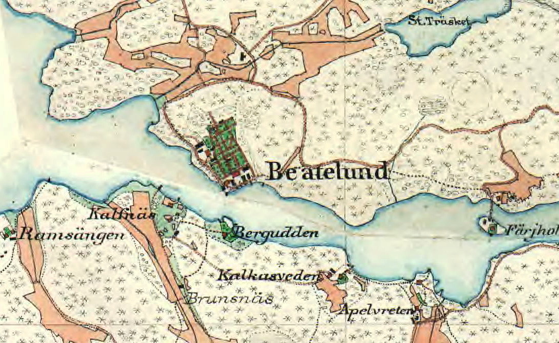 Beatelund på Häradsekonomiska kartan